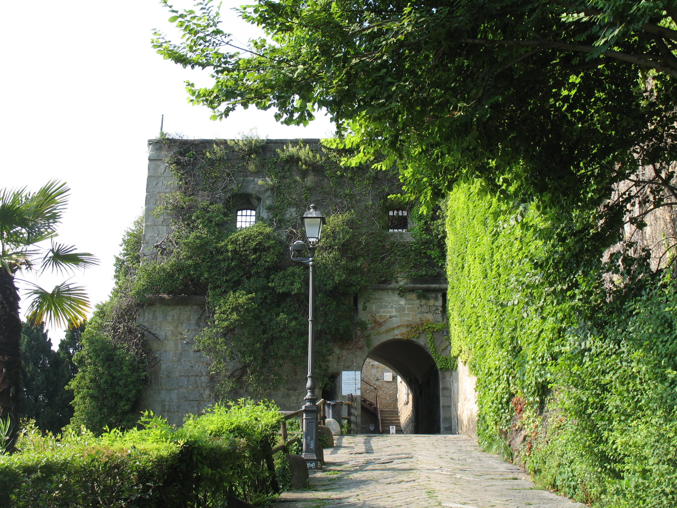 Immagine da Trieste - Castello di San Giusto.